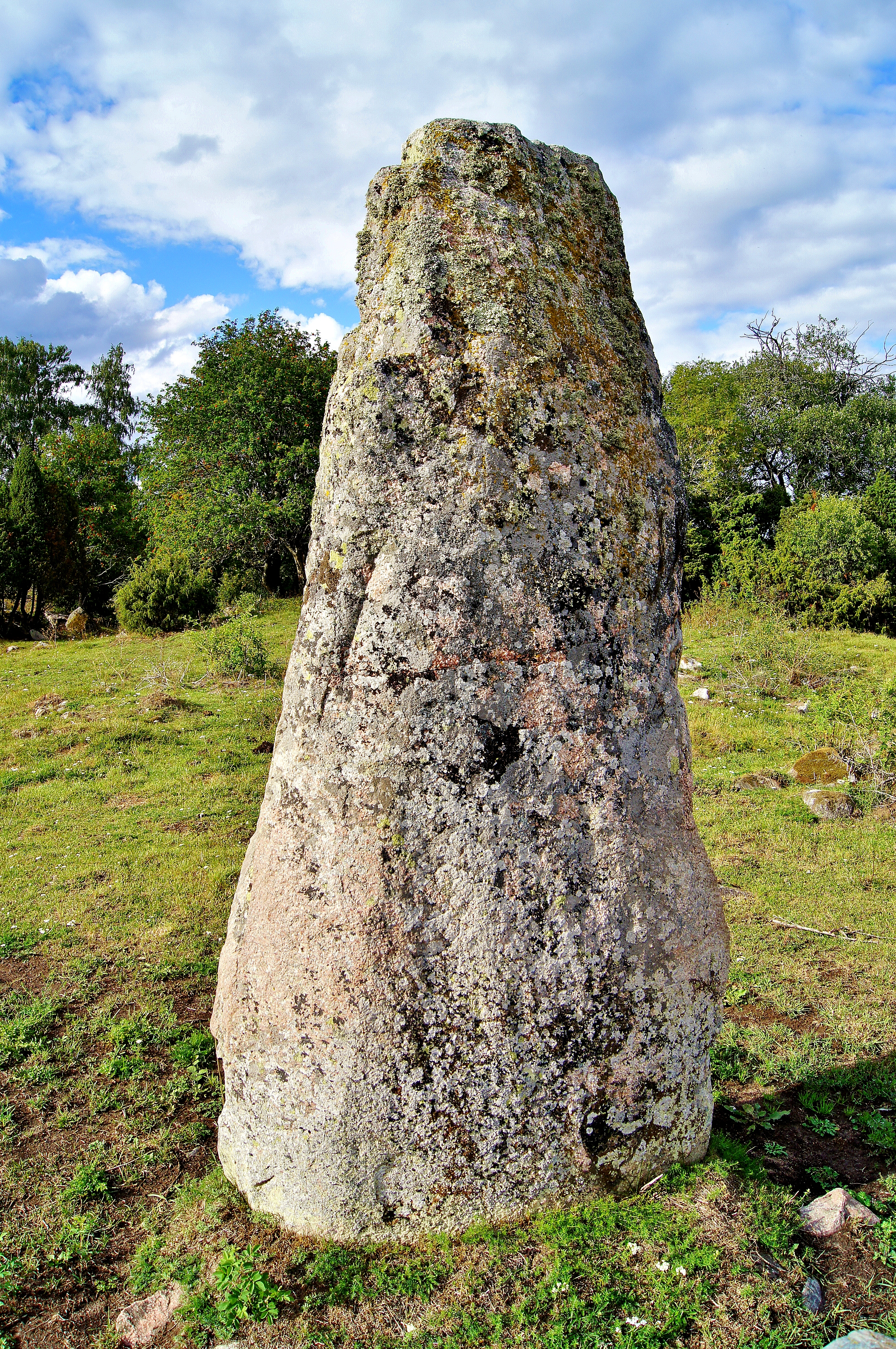 Almunge 18:1